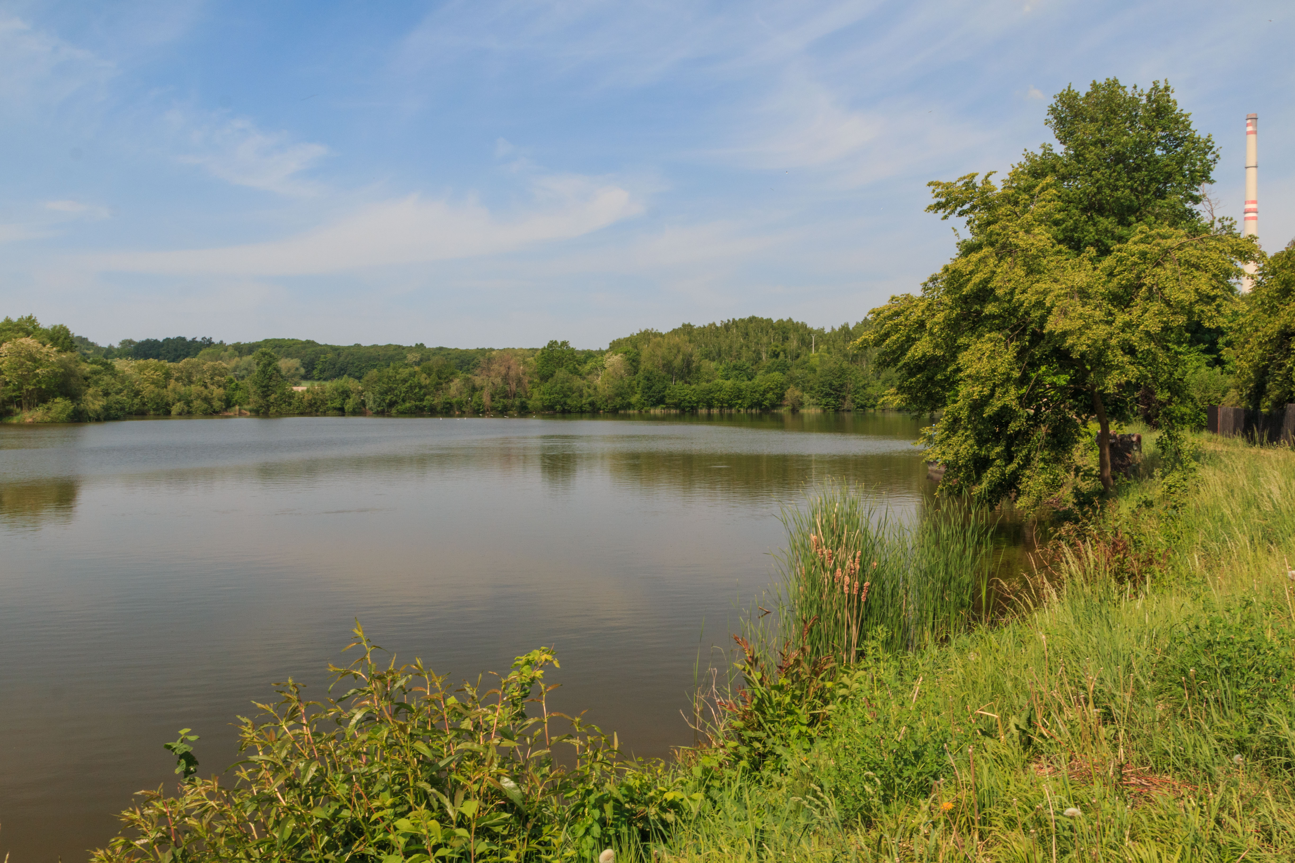 Rybník Pazderna u Zdechovic Project: Vodstvo.